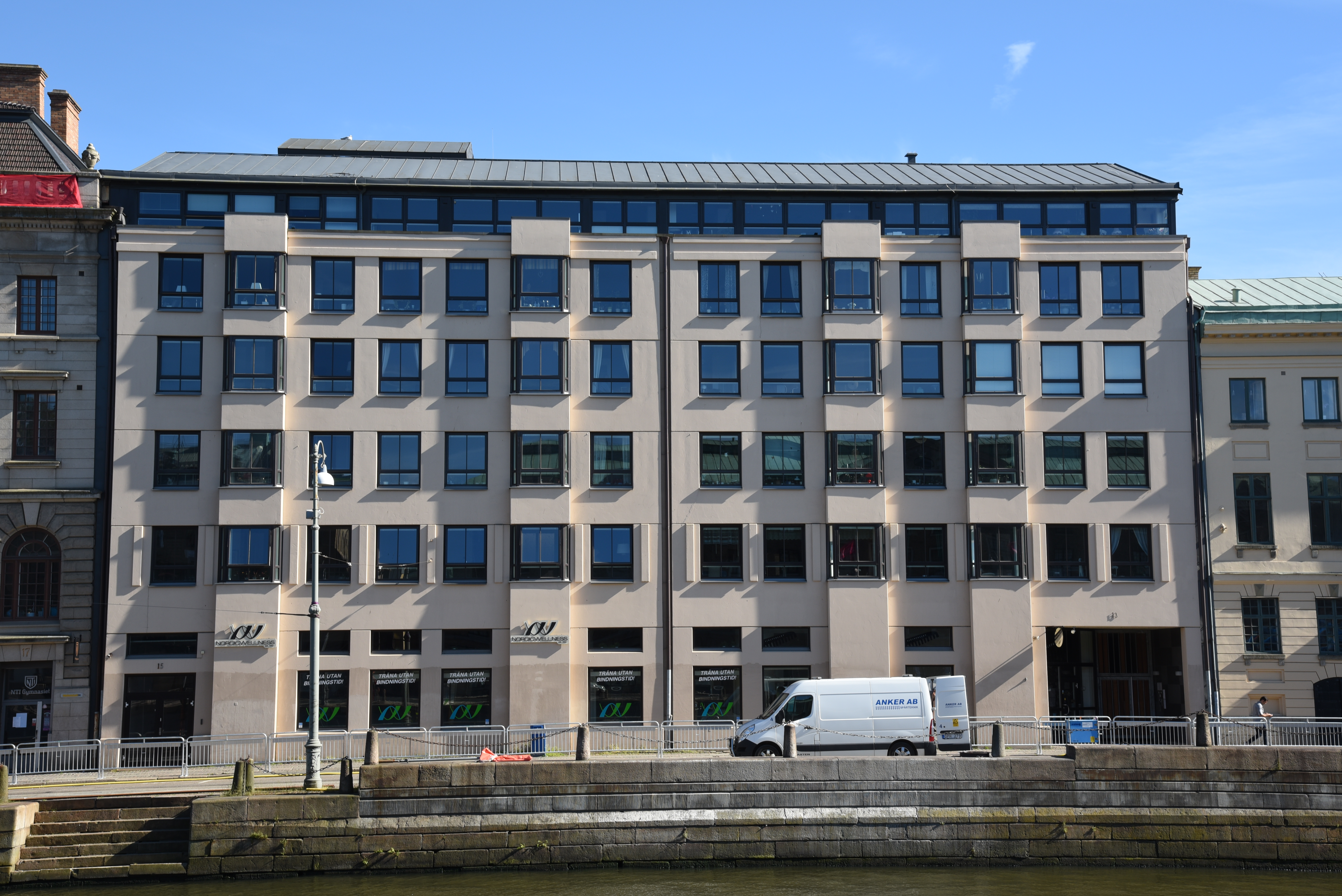 Södra Hamngatan 15-13 i kvarteret Kommerserådet i stadsdelen Inom Vallgraven i Göteborg. Byggnaden uppfördes år 1980 för Siab efter ritningar av Rune Falk. Byggnaden ersatte sex äldre hus från 1800-talet och innehåller bostadsrätter och kontorslokaler